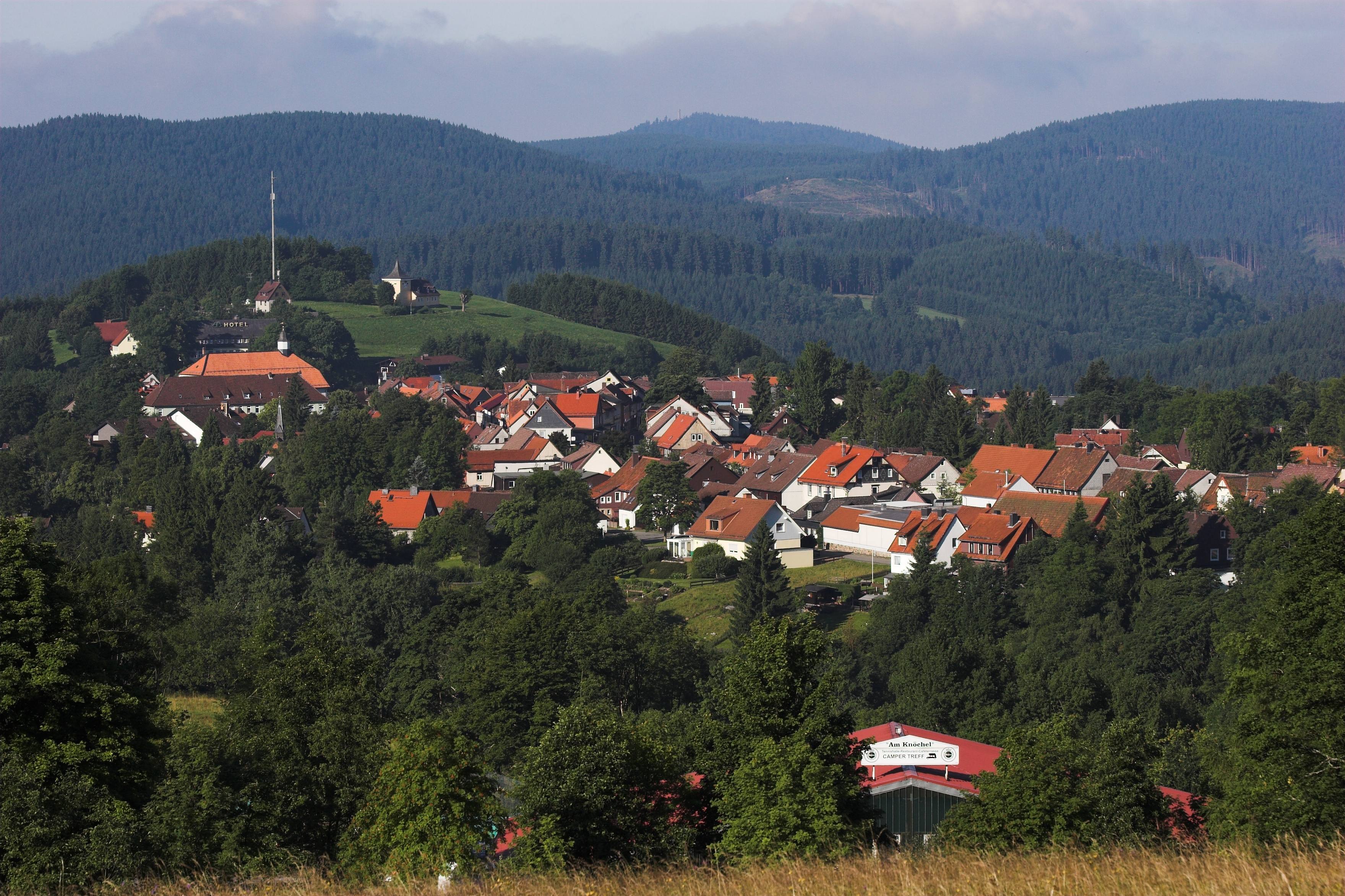 Der Glockenberg und die Oberstadt von Sankt Andreasberg, aufgenommen von der Jordanshöhe. Im Hintergrund der Große Knollen und die Aschentalhalbe